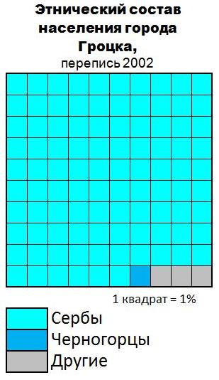 Этнический состав населения города Гроцка (2002)